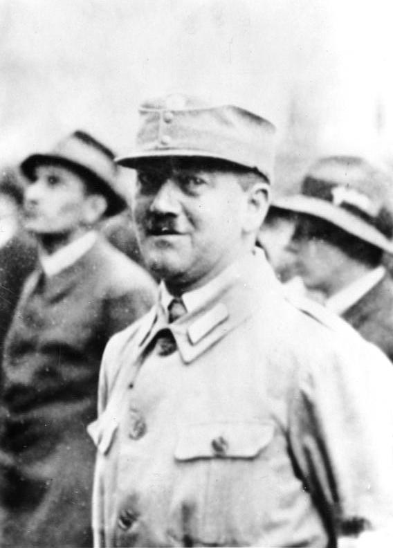 This description has been identified as biased or incorrect: Das Foto wurde wohl später zum obigen Ereignis veröffentlicht. Es wurde sehr wahrscheinlich am 7. Oktober 1928 in Wiener Neustadt gemacht. Siehe: Aufmarsch der Heimwehr und des Schutzbundes in Wiener NeustadtMajor Pabst aus Oesterreich ausgewiesen. Der bekannte Heimwehr-Führer Major Pabst ist in Wien verhaftet und aus dem Bereich der oesterreichischen Republik ausgewiesen worden. In Heimwehrkreisen hat der Beschluss der Regierung grosse Erregung hervorgerufen. Major Pabst hat die oesterreichische Hauptstadt im Flugzeug verlassen; er begab sich nach Italien.